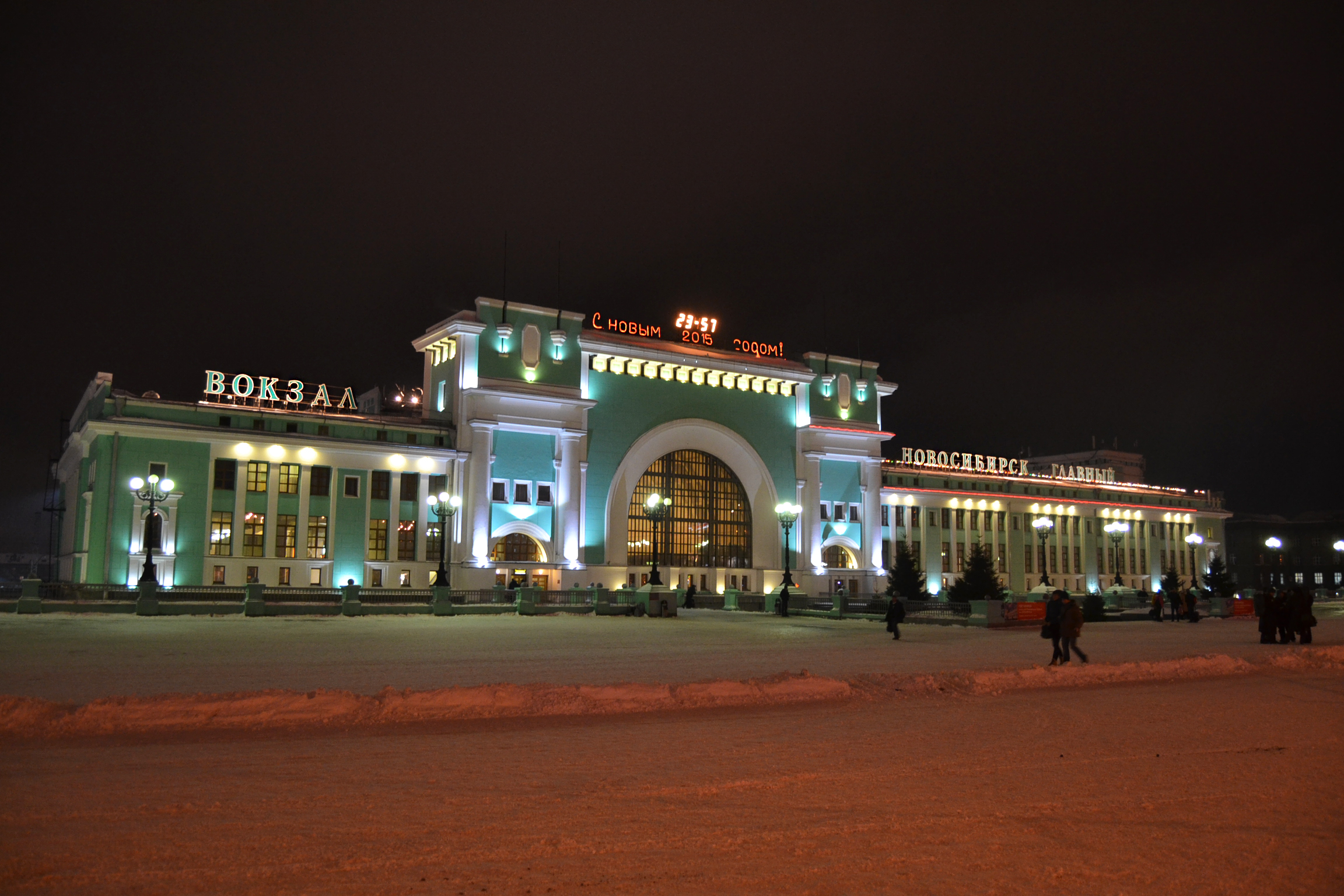 Станция Новосибирск-Главный